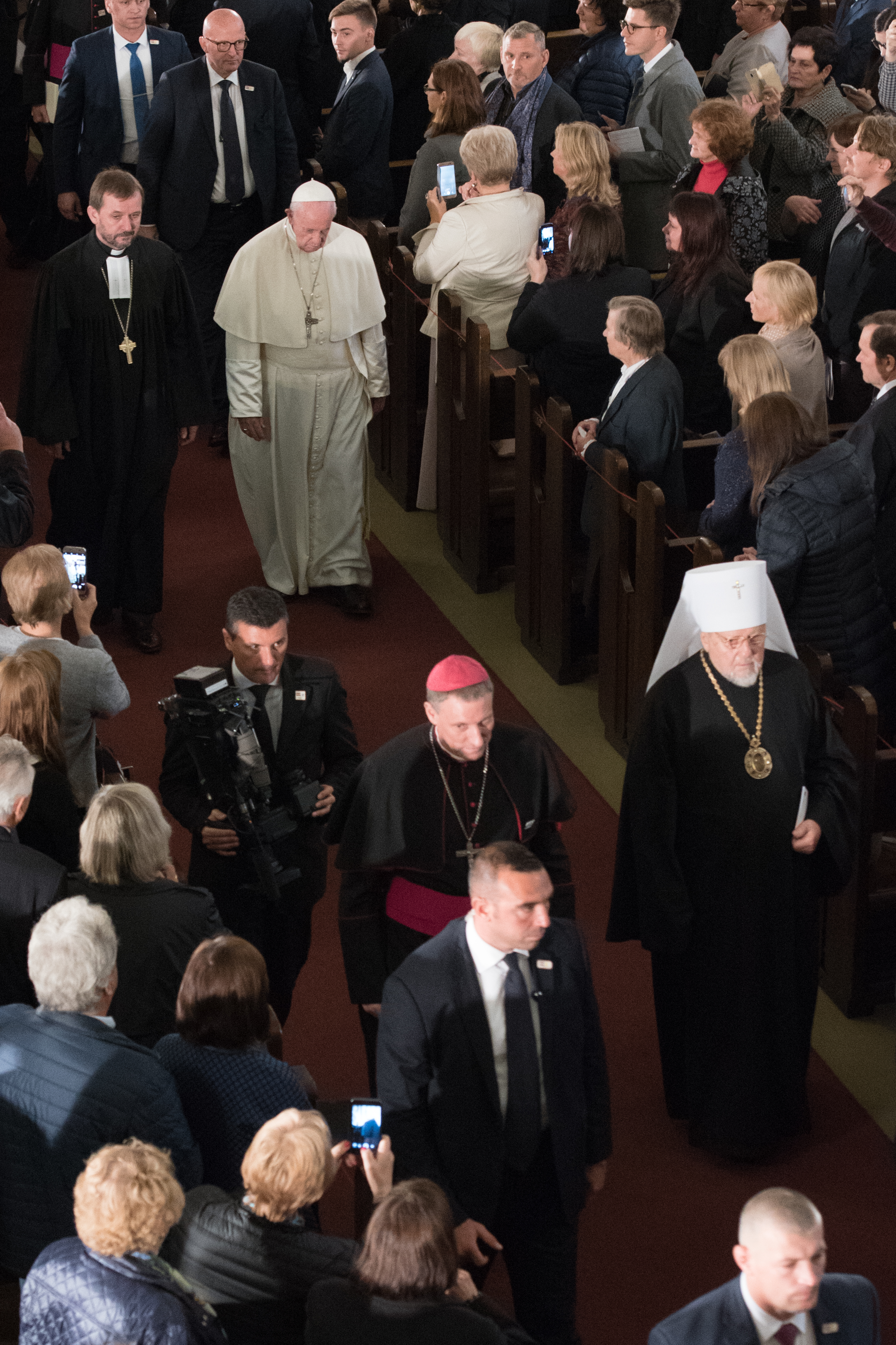 2018.gada 24.septembris. Ekumēnisks dievkalpojums Rīgas Domā. Foto: Ilgonis Linde, Saeima Izmantošanas noteikumi: saeima.lv/lv/autortiesibas